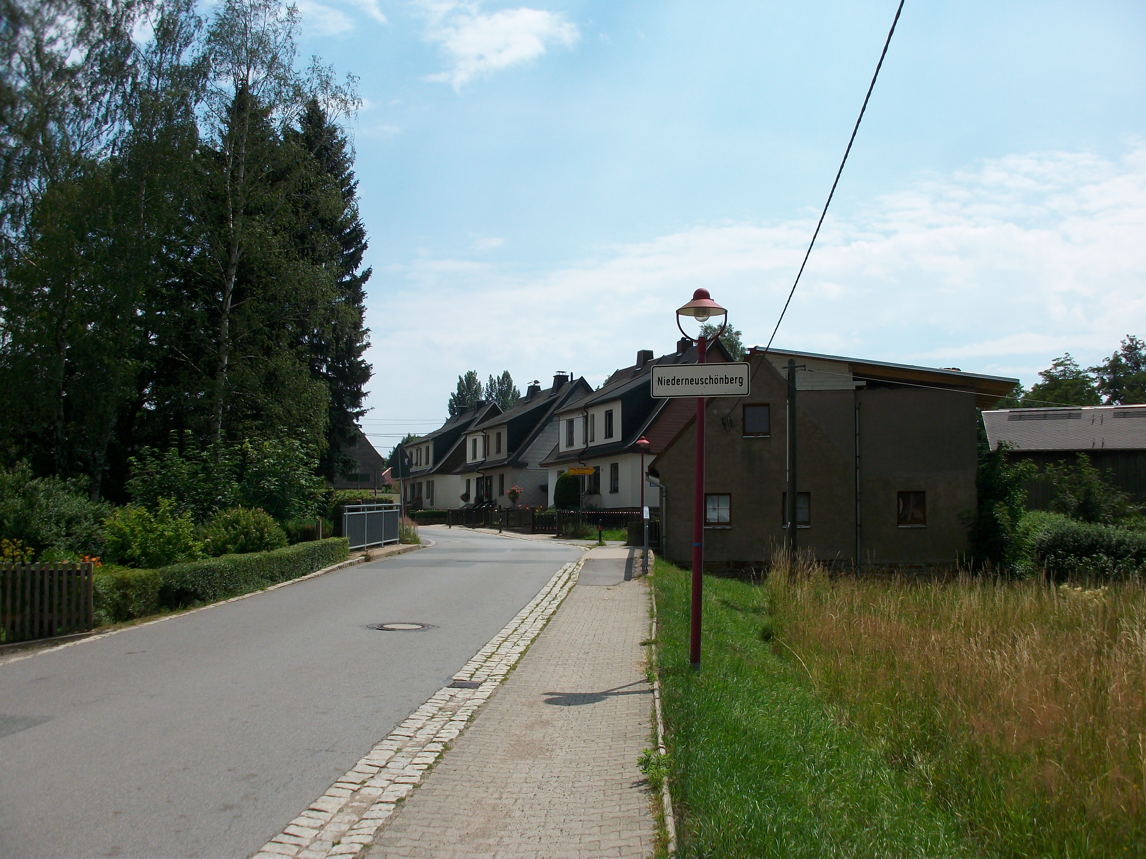 Niederneuschönberg, Ortsteingang